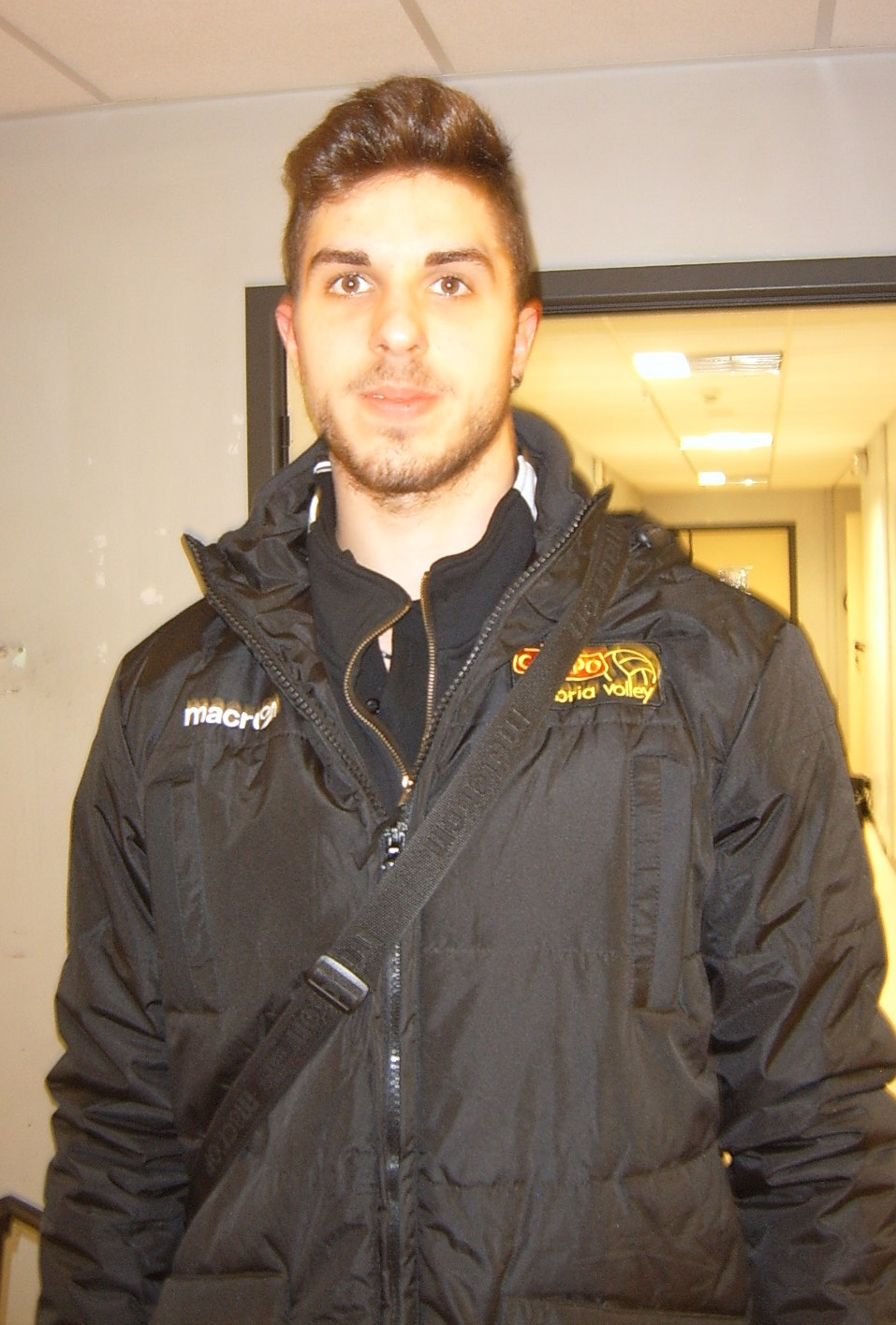 Serie A1 2013-2014